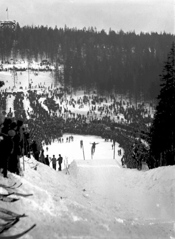 Holmenkollbakken